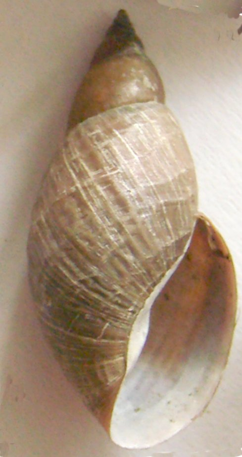 Powierzchnia muszli określana jako "młotkowana" u Lymnaea (Galba) corvus